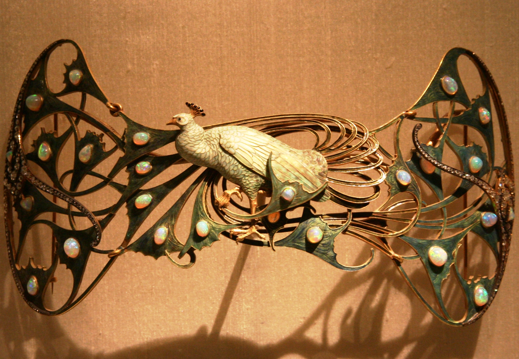 Broche de Lalique